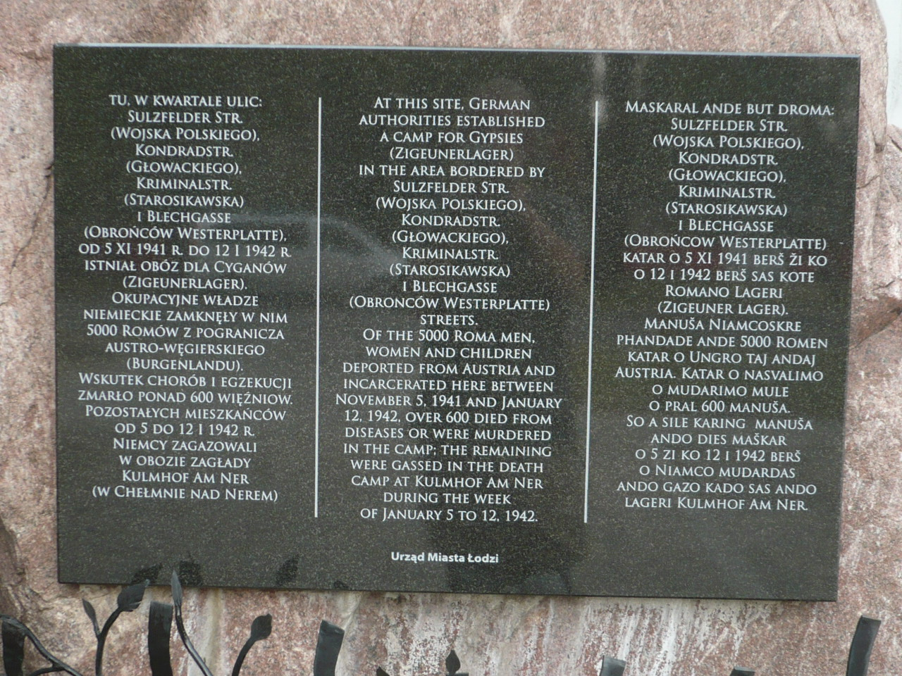 Widok ogólny trójęzycznej tablicy pamiątkowej (z drobnymi błędami; stan z VIII 2015) tzw. "kuźni Romów" - miejsca pamięci po obozie cygańskim funkcjonującym na obszarze łódzkiego getta w okresie od XI 1941 do I 1942. Łódź, ul. Wojska Polskiego 88; oddz. Muzeum Tradycji Niepodległościowych w Łodzi.